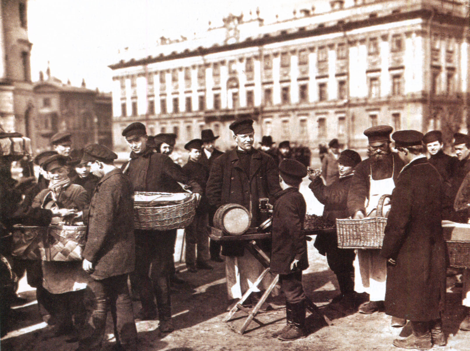 Продавцы сбитня на Марсовом поле в Петербурге. Начало XX века.